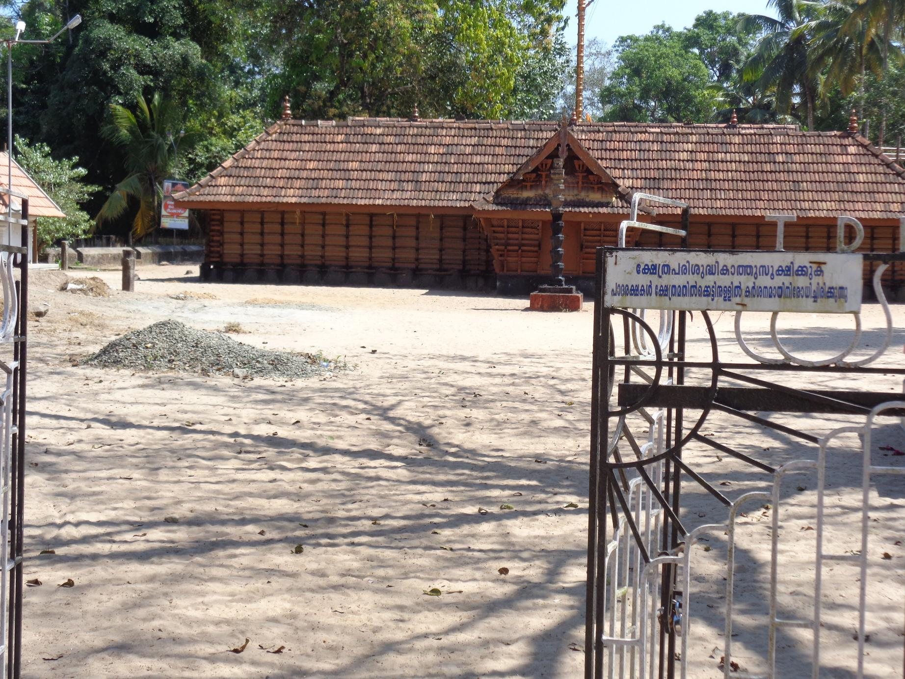 karazhma devi temple, chennithala, mavelikara